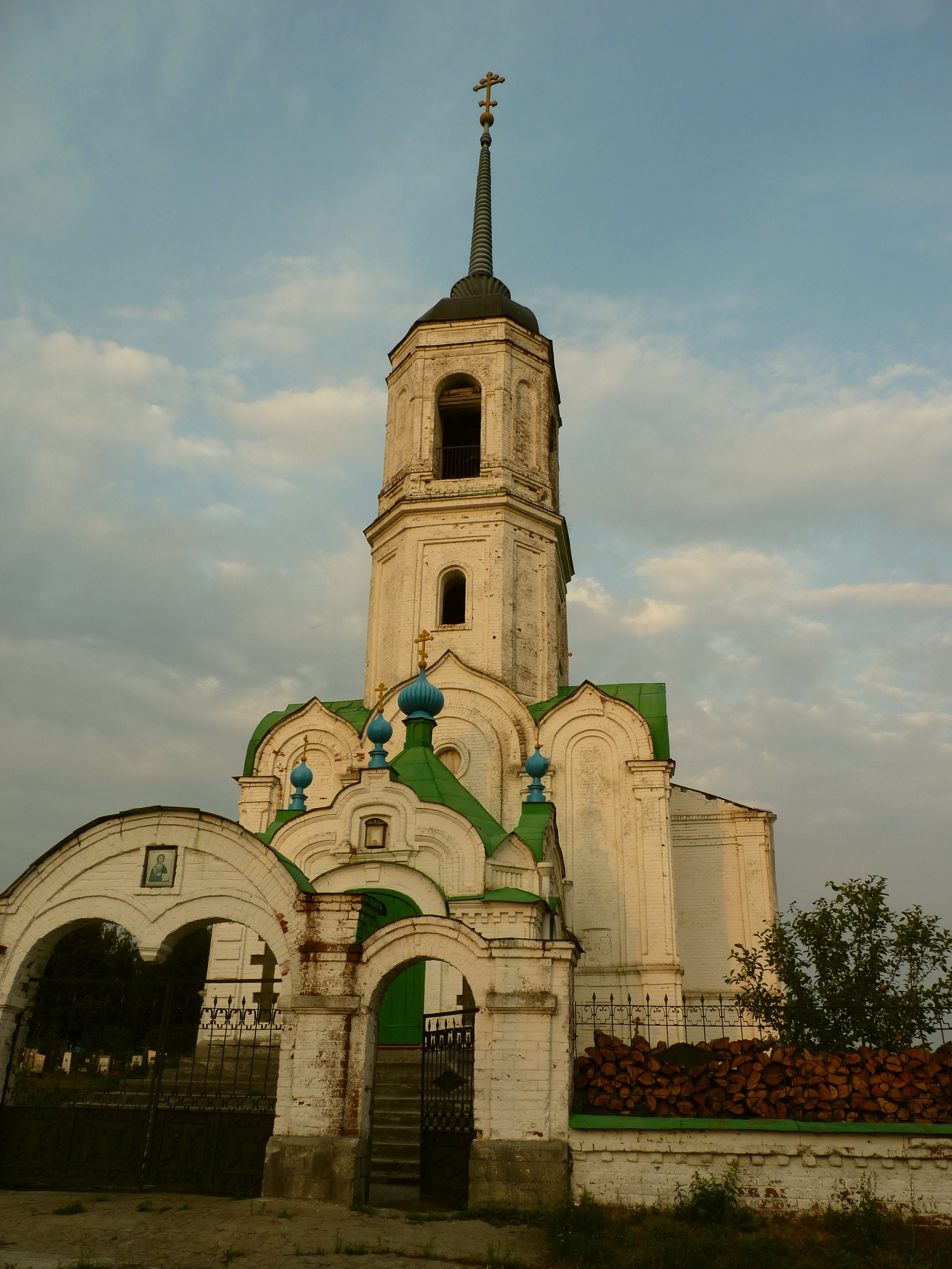 храм святителя Николая в с.Ст.Котлицы Владимирской обл. 2010 год